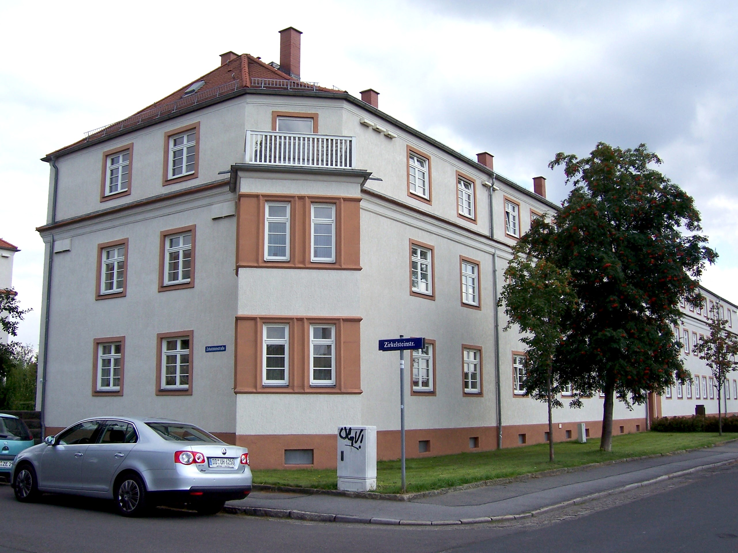 Siedlung des Spar- und Bauvereins in Dresden-Gruna, Gebäude auf dem Frauensteiner Platz, Ecke Zirkelsteinstraße mit Eckerker